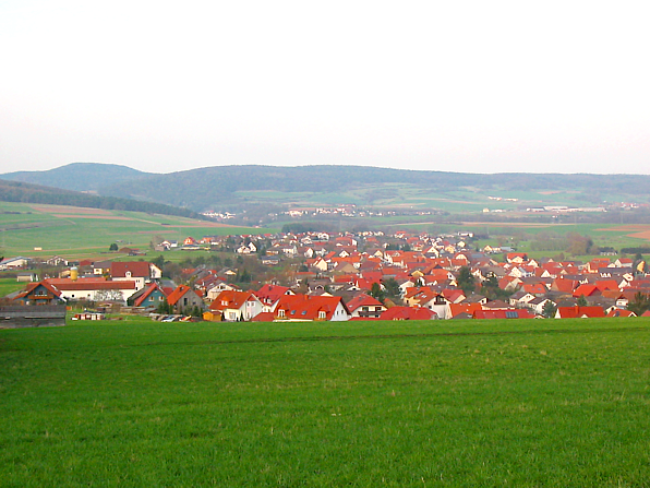 Landenhausen (April 2006)